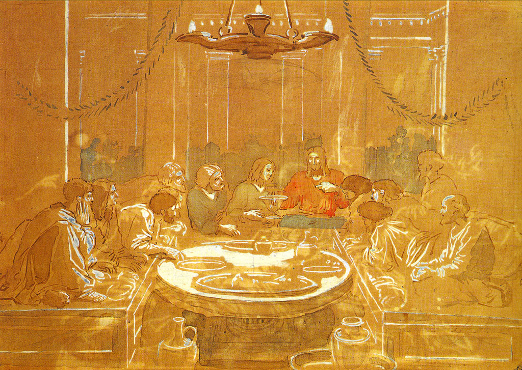 Тайная вечеря